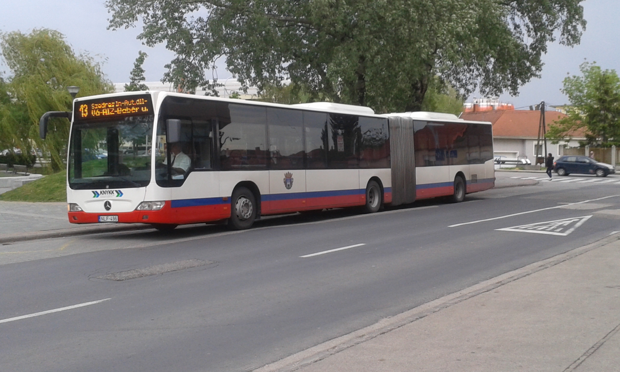 NLF-469 az Uszoda megállóban 13-as járaton.